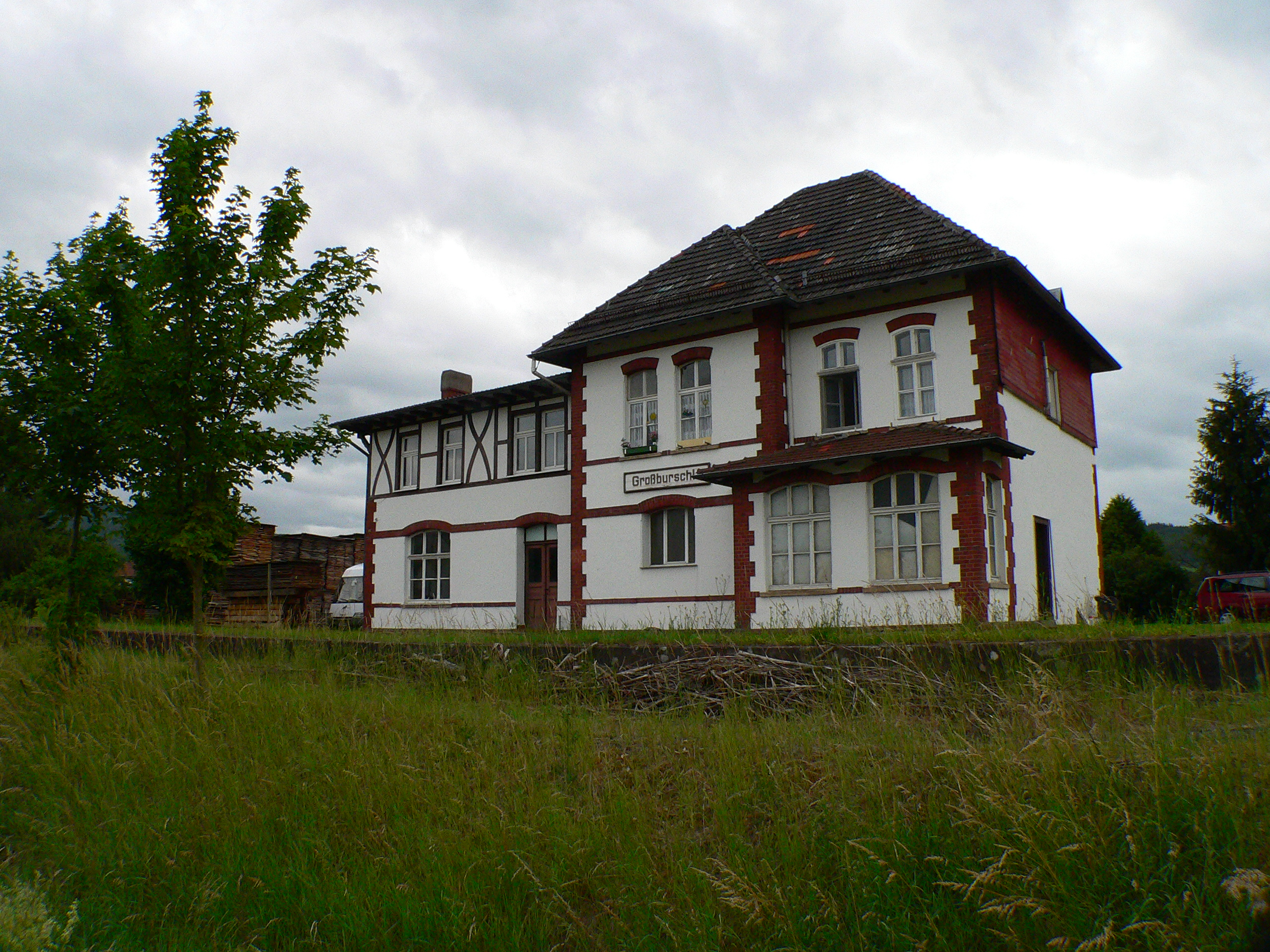 Ehemalige Bahnlinie Schwebda-Wartha: Bahnhof Großburschla